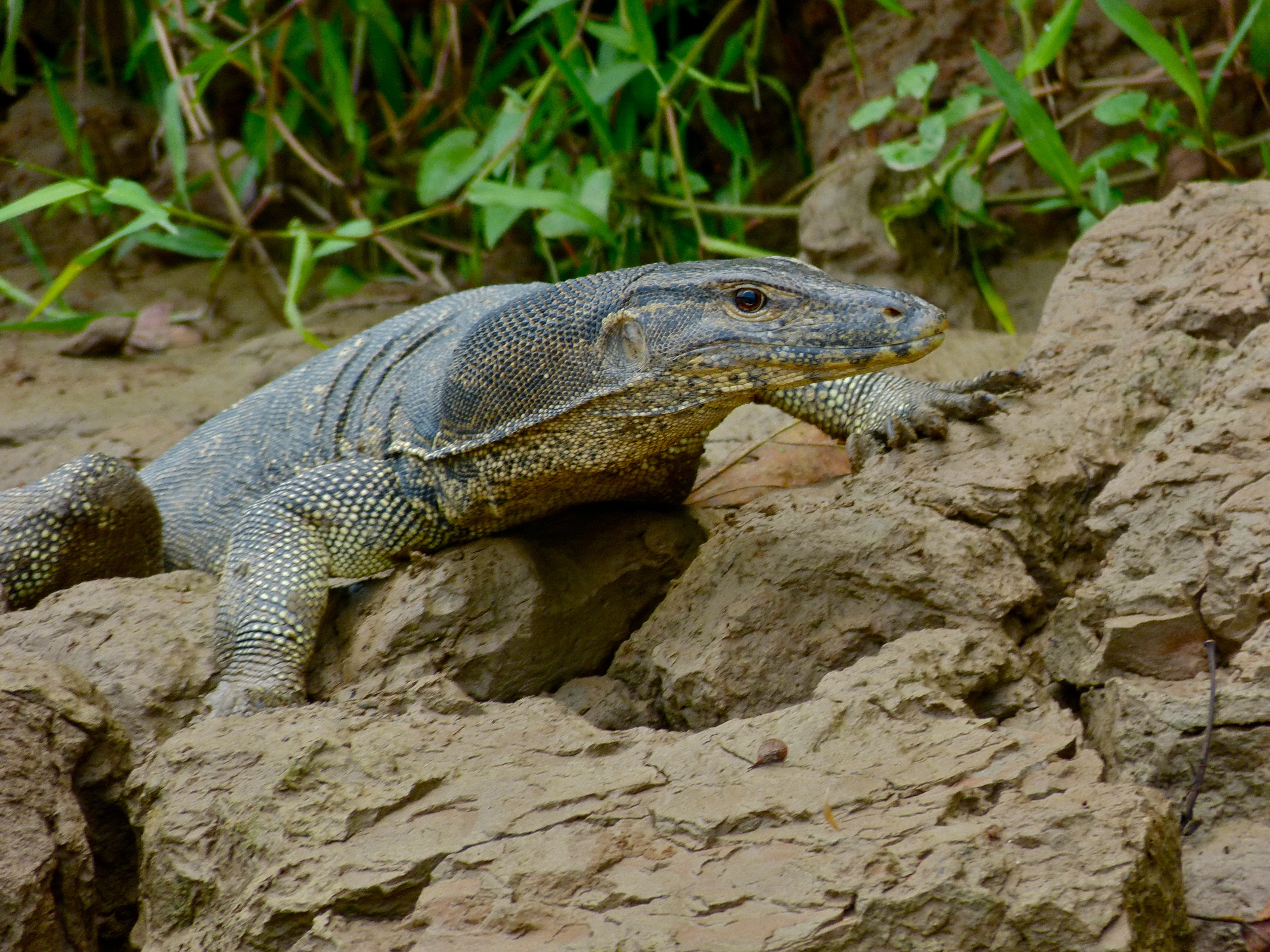 Kinabatangan River, Bilit, Sabah, MALAYSIA